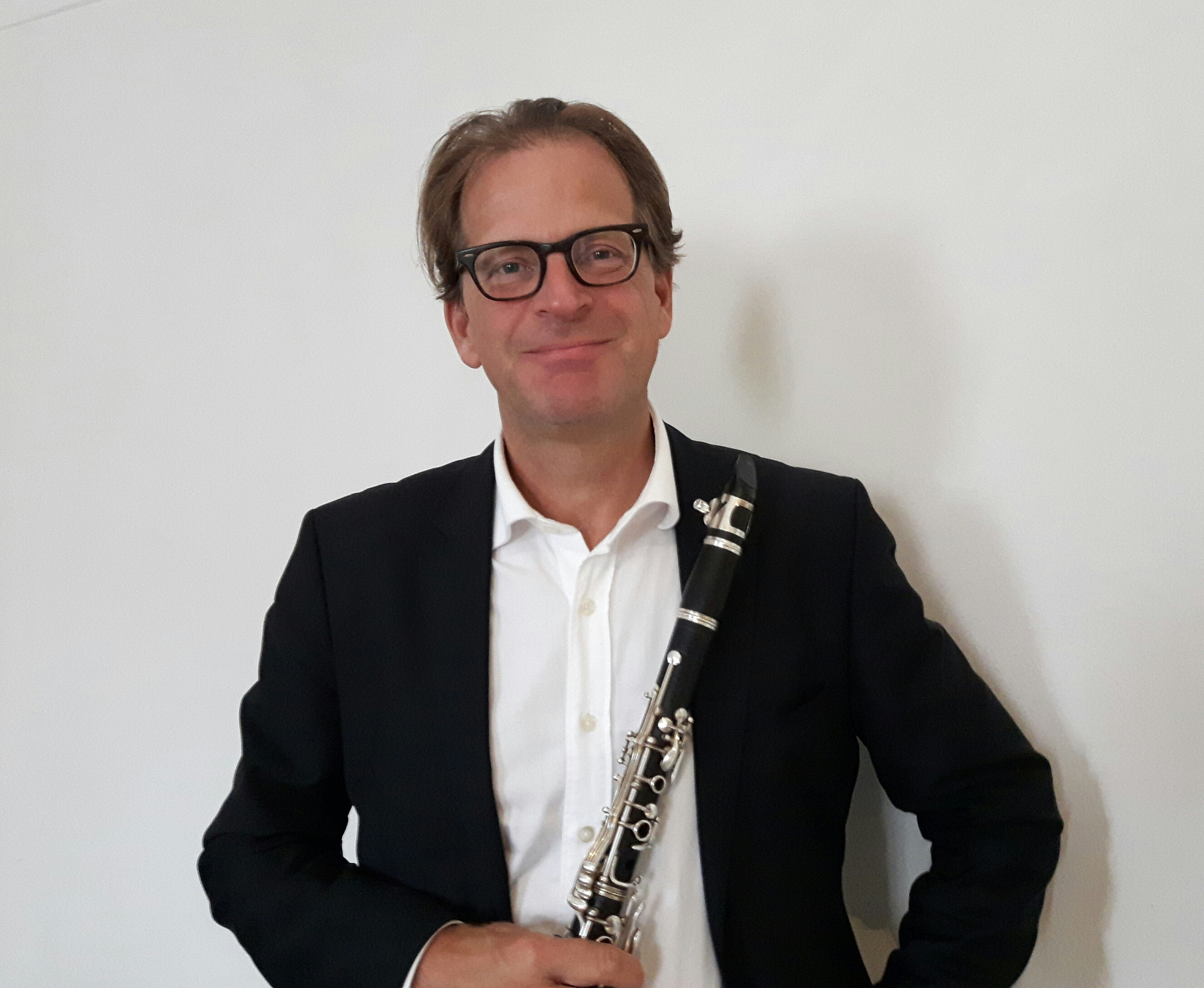 Staffan Mårtensson, svensk klarinettist